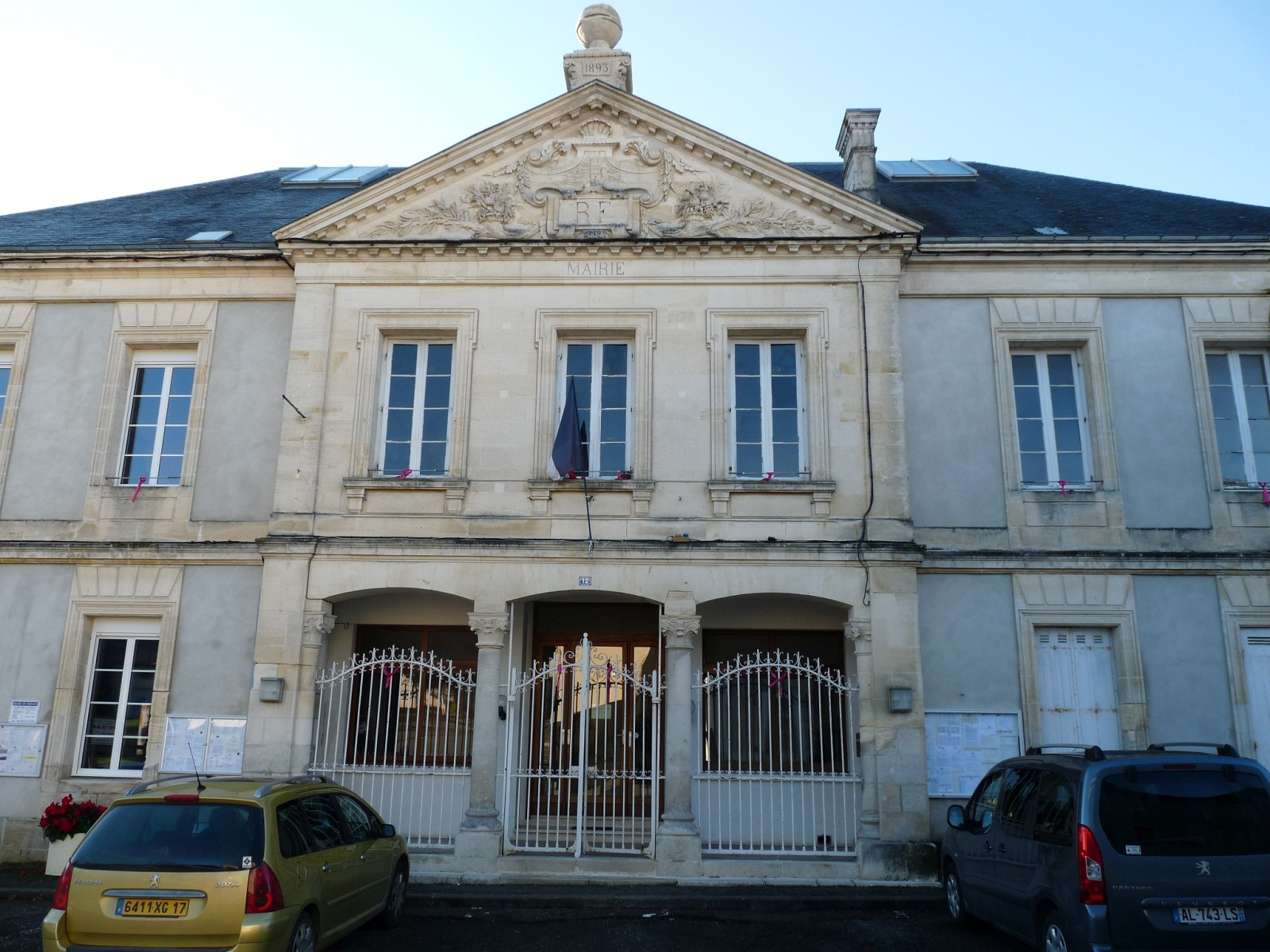 Mairie de Cercoux, Charente-Maritime, France